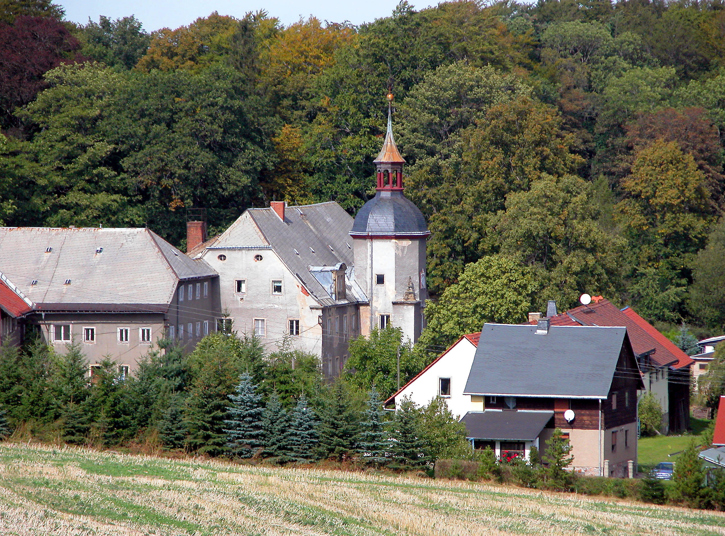 18.09.2004 01762 Naundorf (Dippoldiswalde), Schloßberg 1: Rittergut, Schloß (GMP: 50.840676,13.656128). Der Hauptflügel ist in der zweiten Hälfte des 17. Jahrhunderts für die Familie von Bünau erbaut worden. Der im Turm befindliche Treppenaufgang führt zu einem älteren Sandsteinportal, welches auf 1608 datiert ist und das Monogramm des Rittergutsbesitzers Wolf von Schönberg zeigt. Dieses Portal könnte aus dem Vorgängerbau stammen und wiederverwendet worden sein. Albert von Carlowitz verkaufte das Rittergut 1846 an den Fabrikanten Wilhelm Eduard Otto. Unter seiner Herrschaft wurde der Landschaftspark gegenüber dem Rittergutshof angelegt. Auf einer Anhöhe ließ der Schloßbesitzer 1865 bis 1867 Ottos Eck errichten. Nach Ottos Tod wurde das Rittergut 1897 an Oskar Bierling verkauft. Der Dresdner Lederfabrikant hat das Schloß ausbauen und erweitern lassen. 1949 bis 1998 diente es als Pflegeheim. Seitdem steht der Herrensitz leer. Sicht von Süden. [DSCN5061]20040918320DR.JPG(c)Blobelt